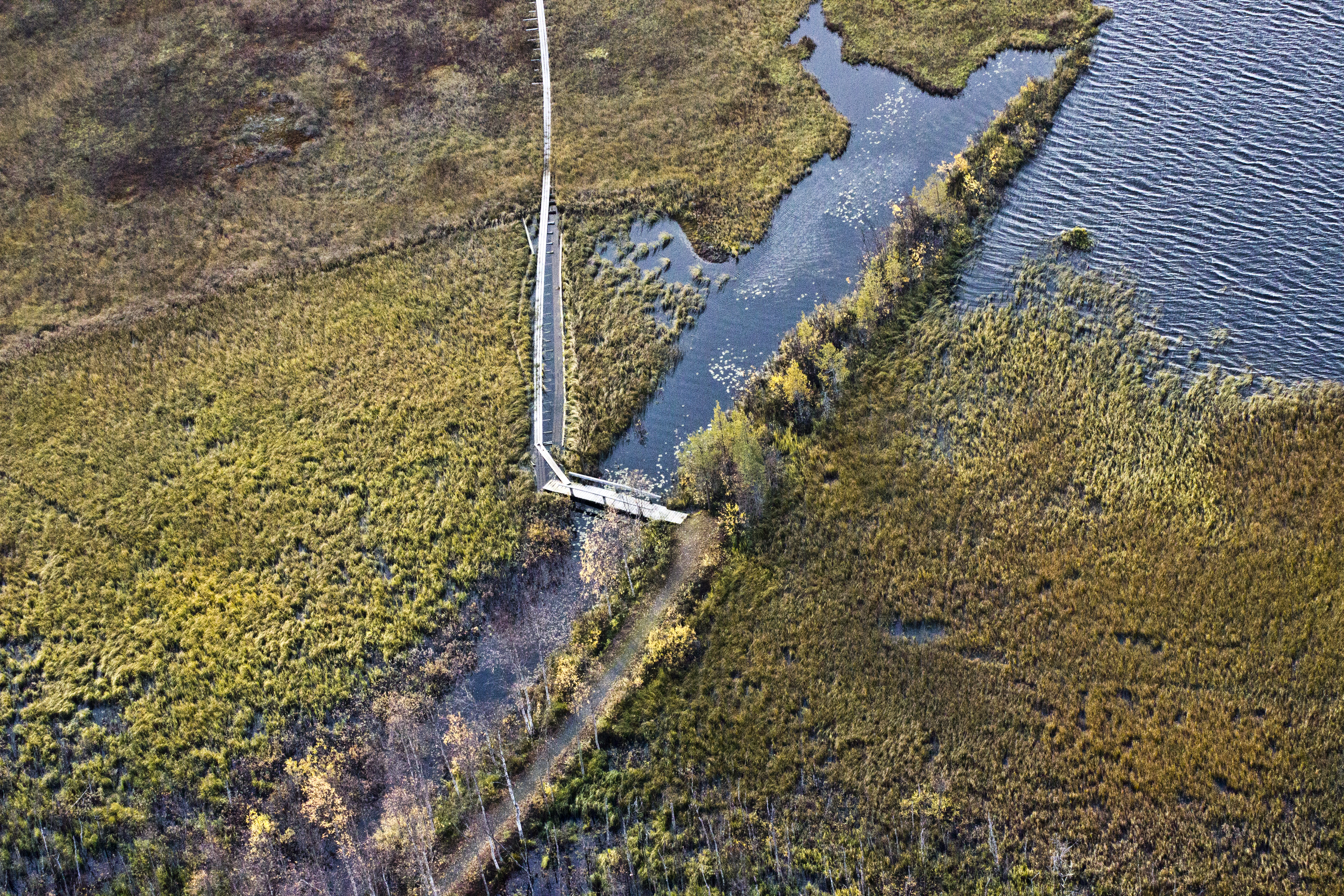 Spångat promenadstråk runt Höträsket i Luleå.